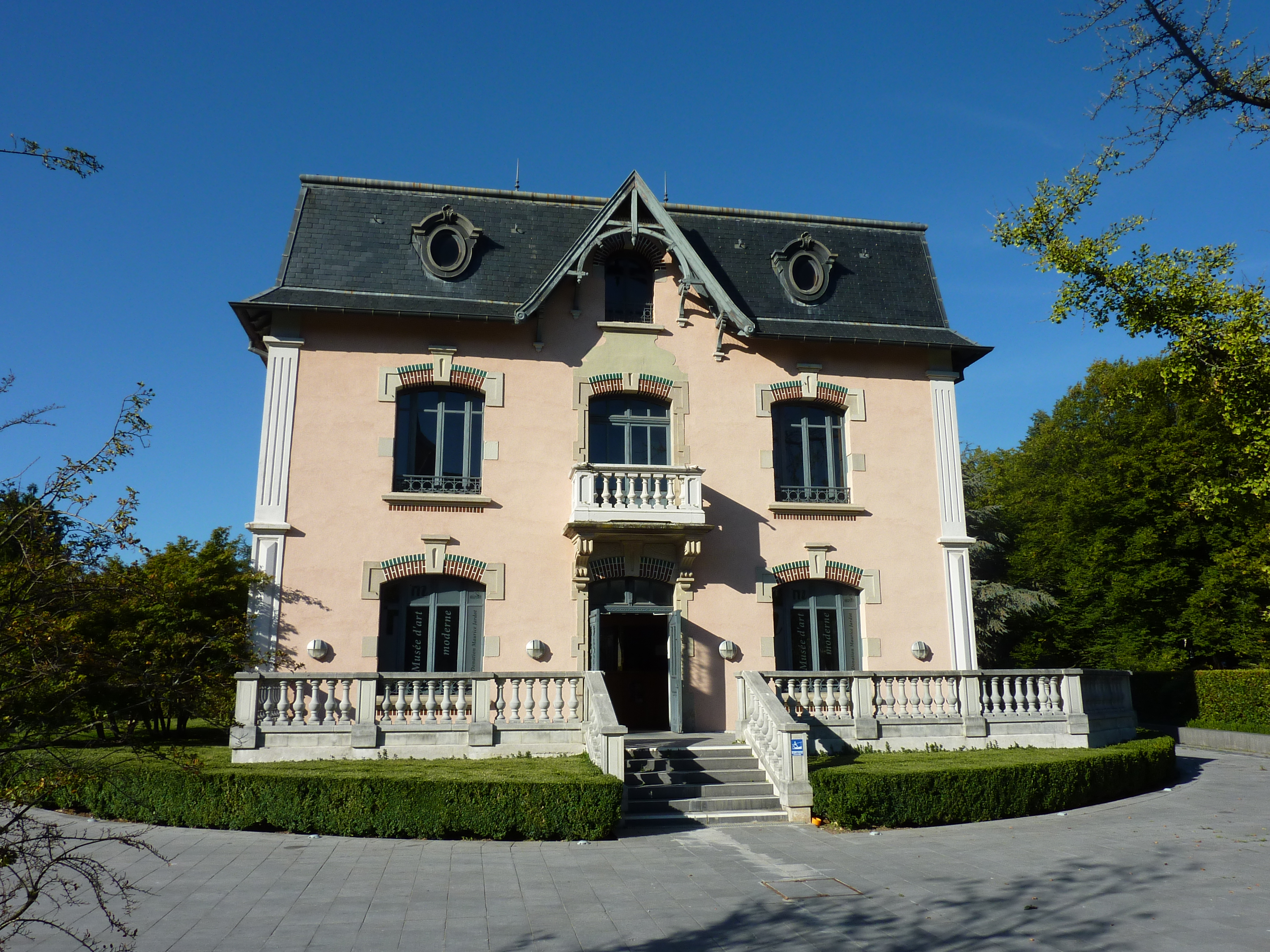 Musée d'Art moderne de Belfort